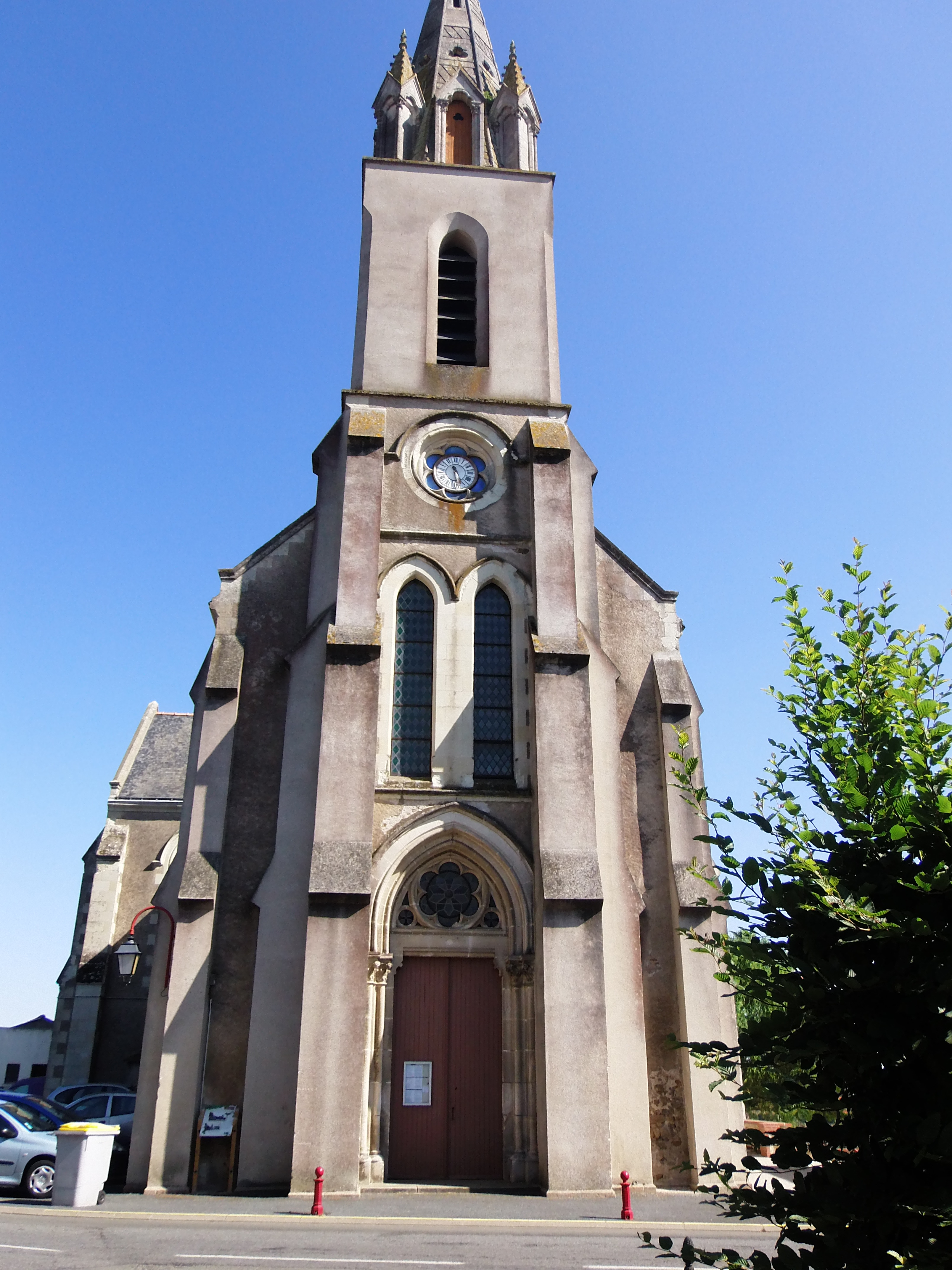 Église Saint-Pierre de Mazières-en-Mauges (Maine-et-Loire, France), paroisse de Notre Dame du Puy aux Lacs. Église du XXe siècle, inscrite à l'Inventaire général du patrimoine culturel (IA49004275). Juillet 2015.